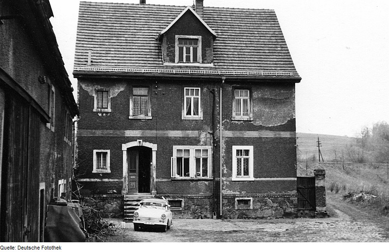 Original image description from the Deutsche FotothekTriebischtal-Roitzschen. Korkmühle, Außenansicht